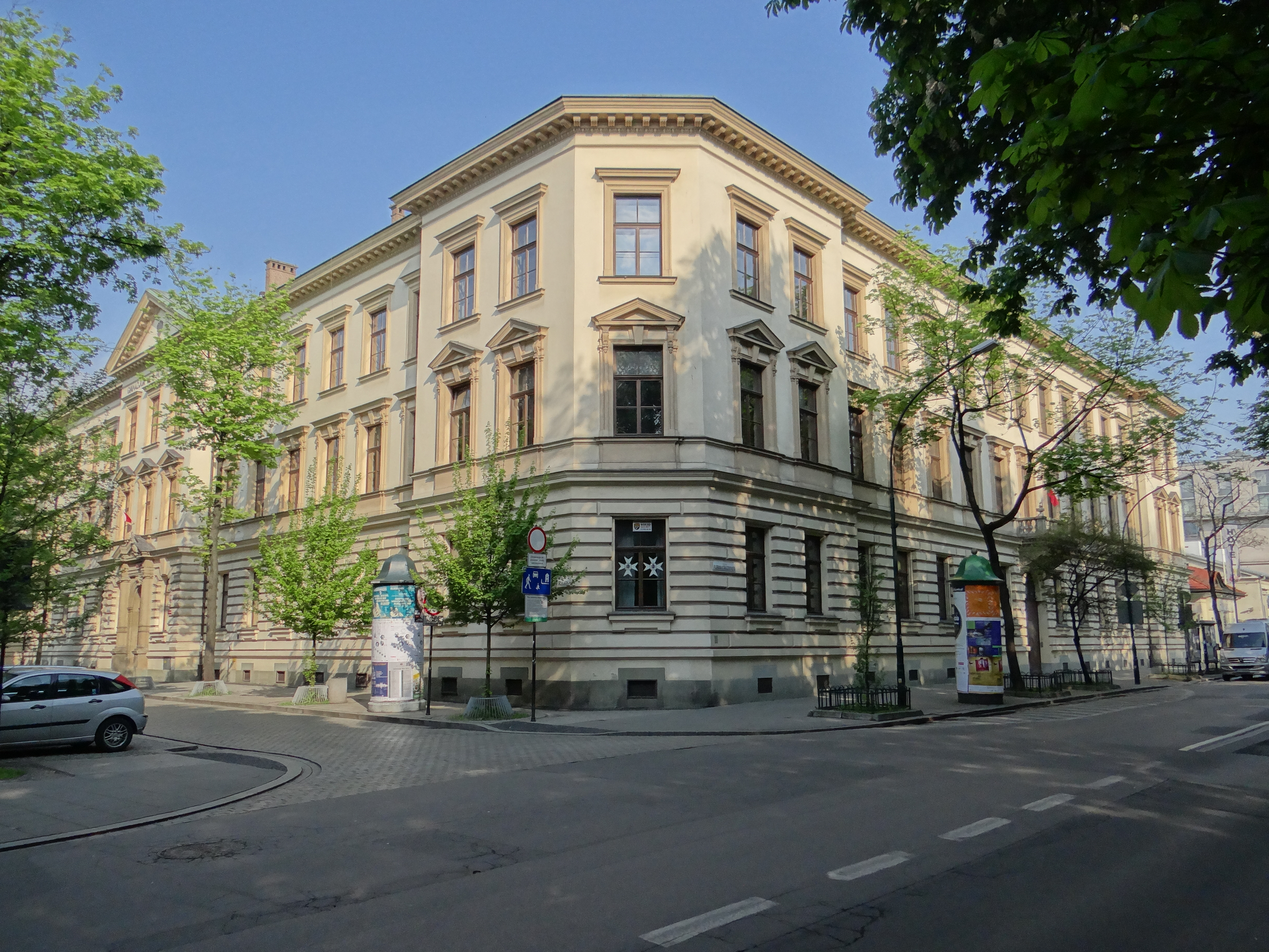 Kraków, szkoła, ob. I L.O., 1897-1899